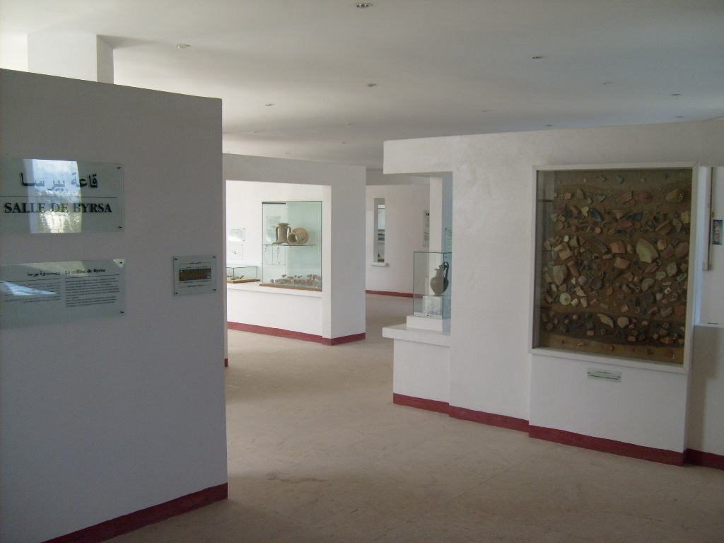 Salle de Byrsa dans le Musée national de Carthage (Tunisie)